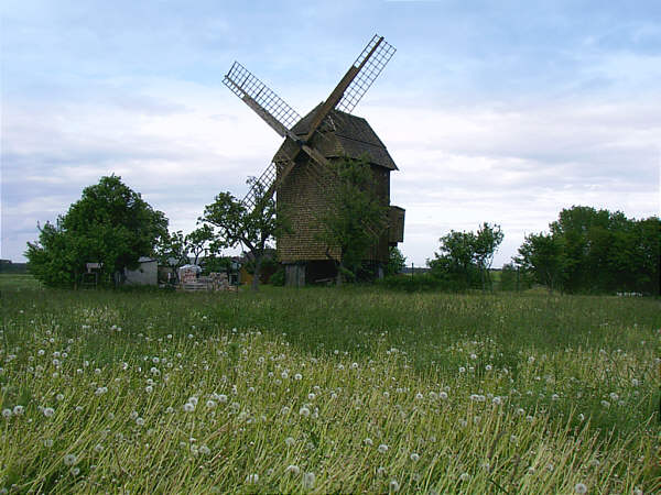 Windmühle in Vehlefanz - self taken photo - PD